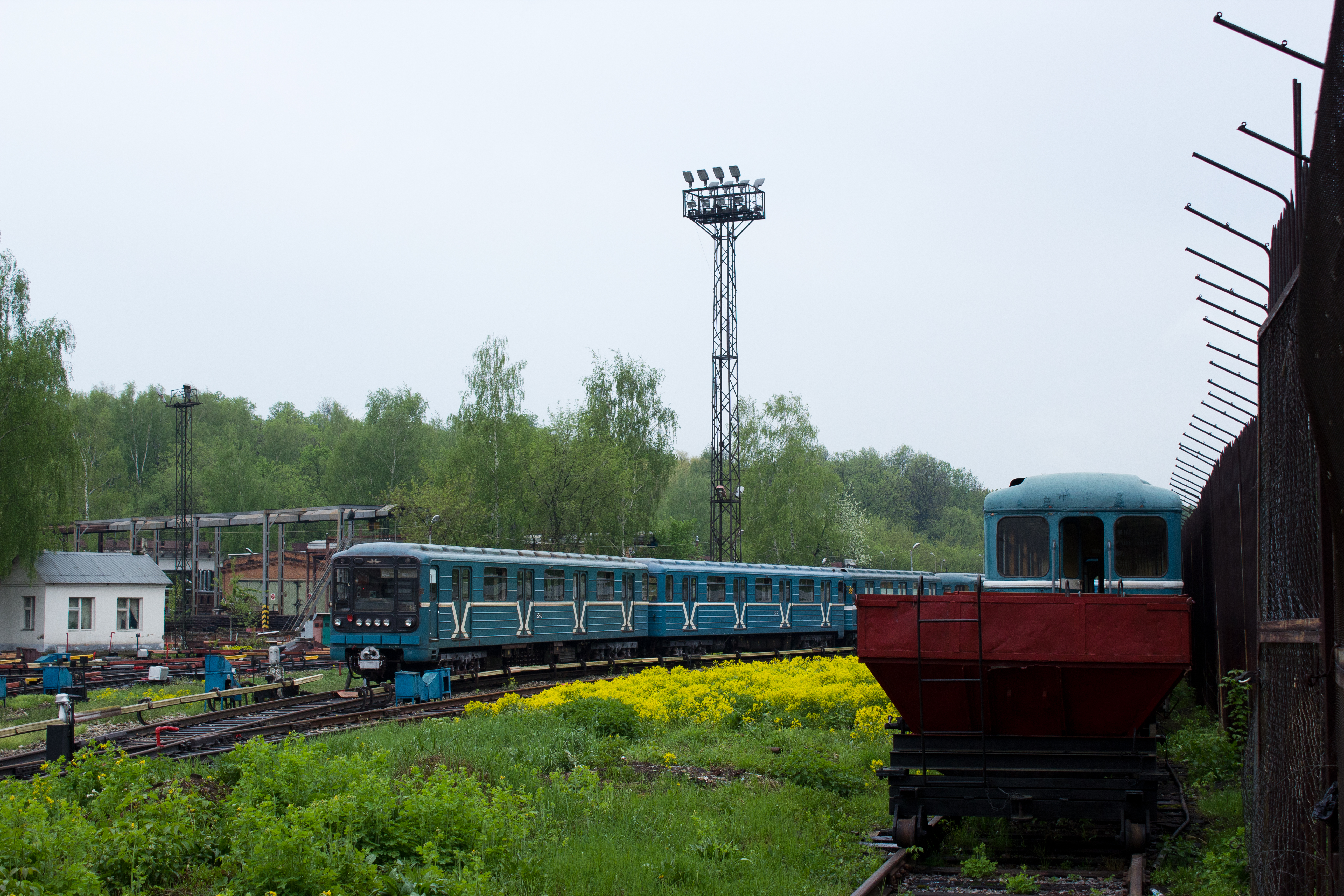 Metro car type 81-717 #9213 in "Izmaylovo" metro depot.